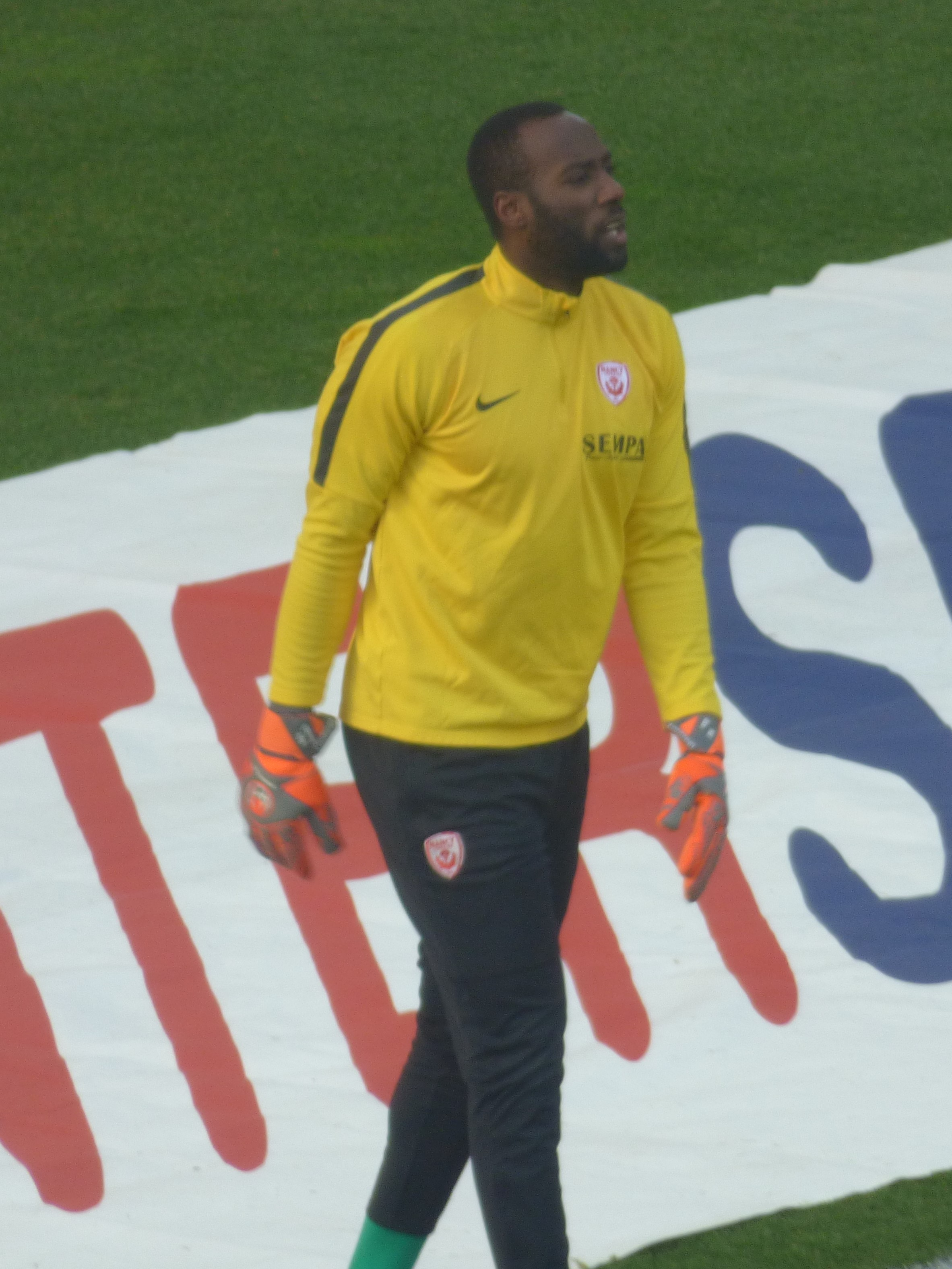 Guy Roland Ndy Assembe avant le match RC Lens / AS Nancy-Lorraine, comptant pour la vingt-et-unième journée du championnat de France de football de Ligue 2 2018-2019, le 19 janvier 2019, au Stade Bollaert-Delelis de Lens.